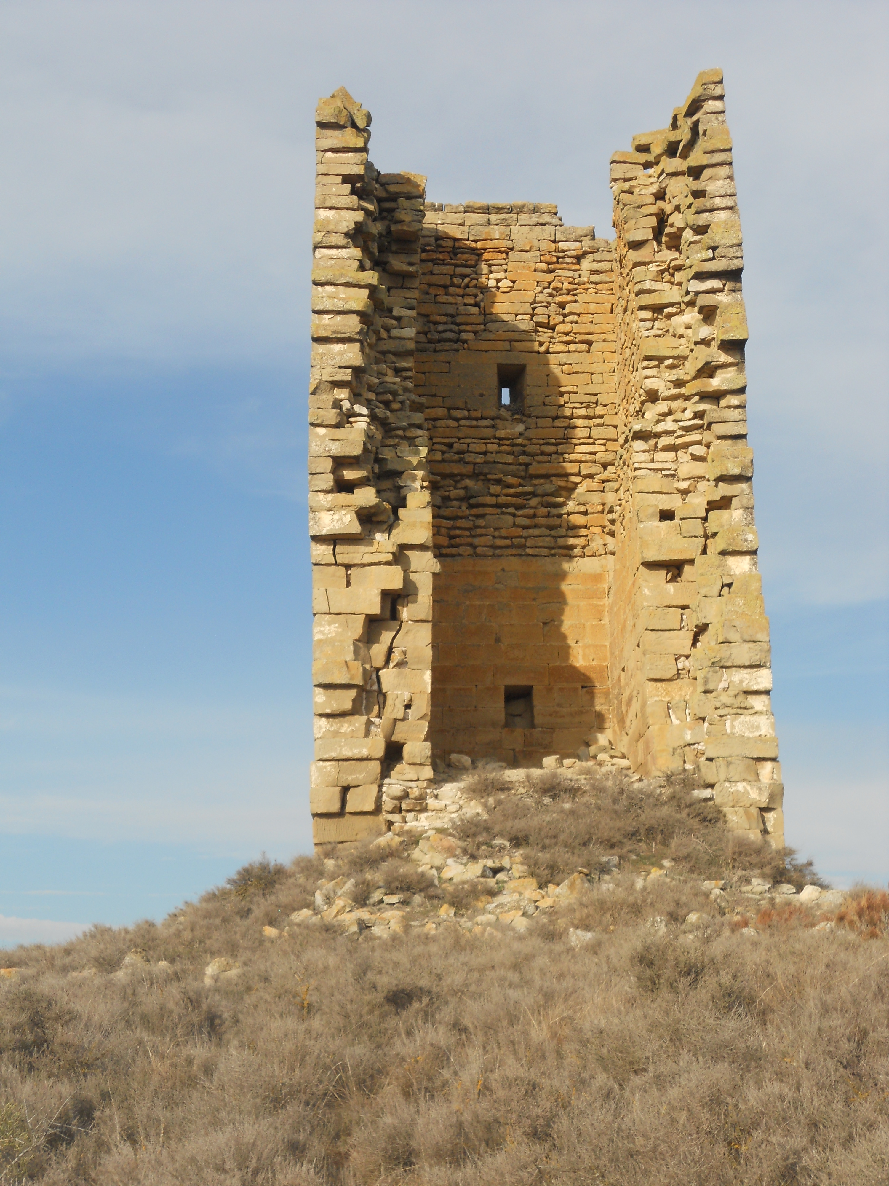 Antiguo torreón de vigilancia en La Sotonera.